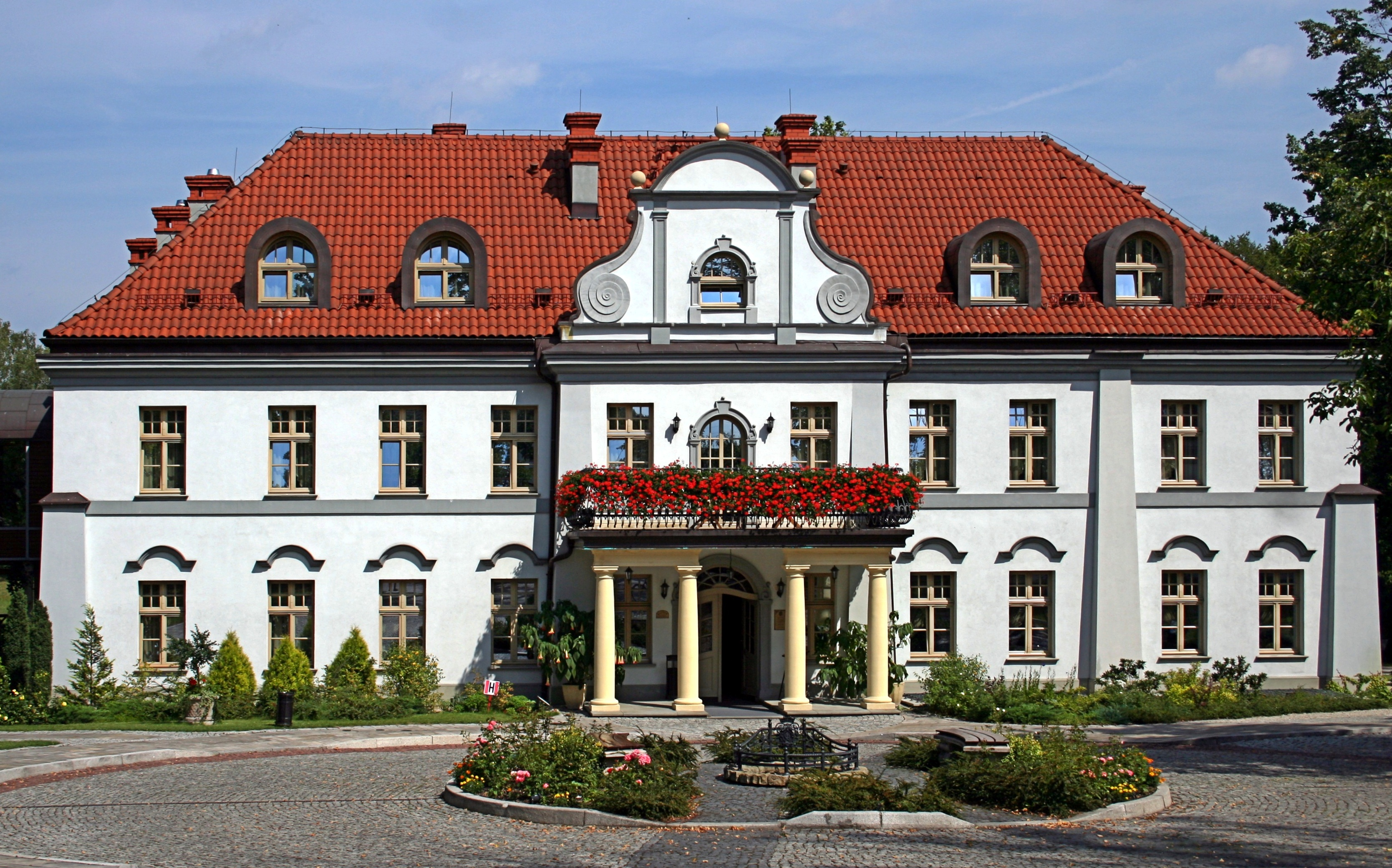 Pałacyk w Czarnym Lesie